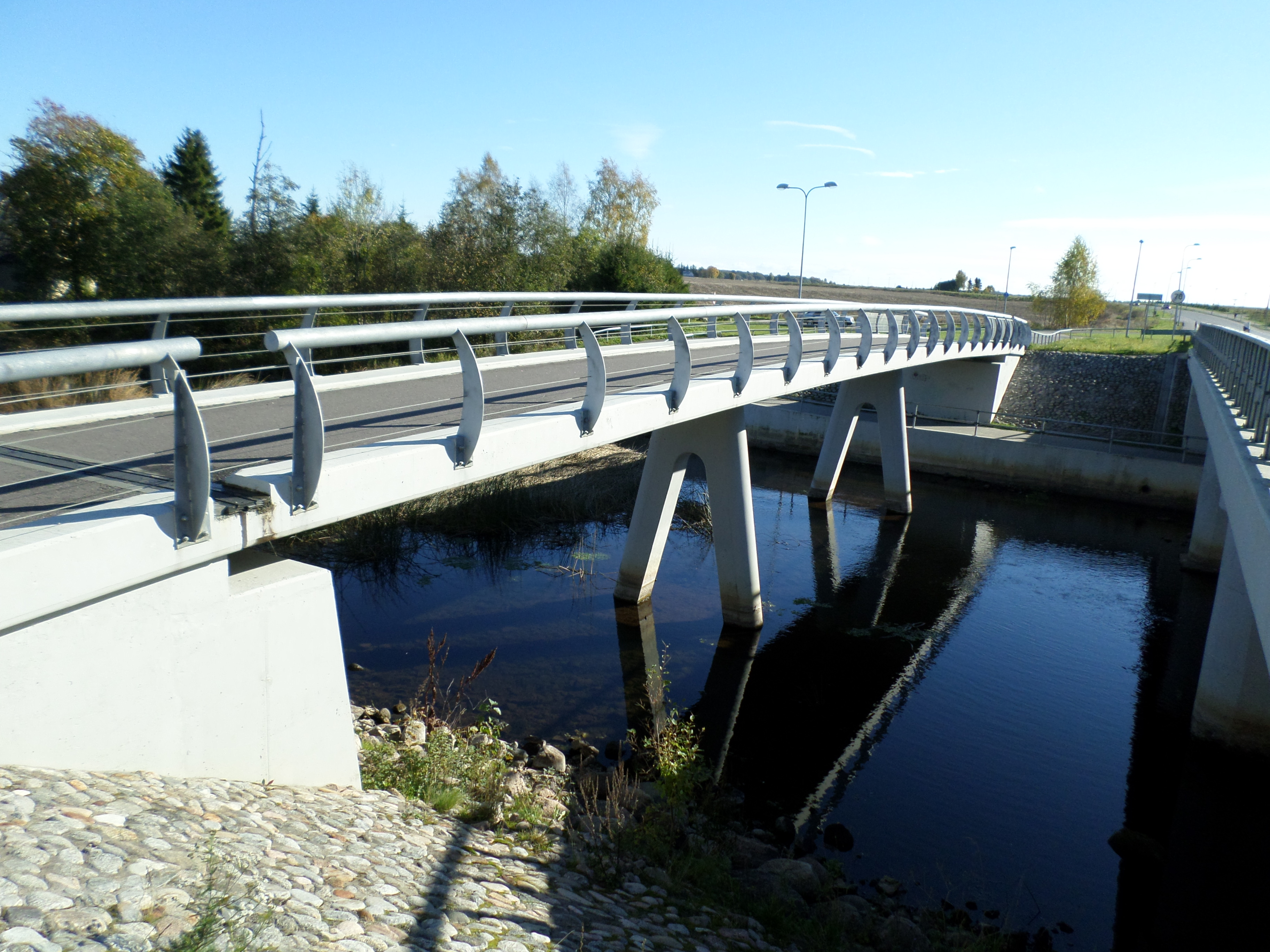 Vaskjala kergliiklustee sild.